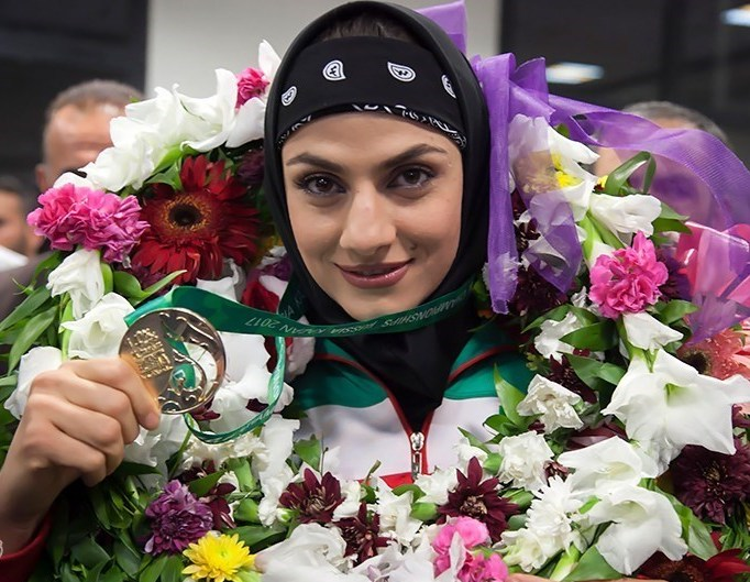 مراسم استقبال از مریم هاشمی در کرمانشاه